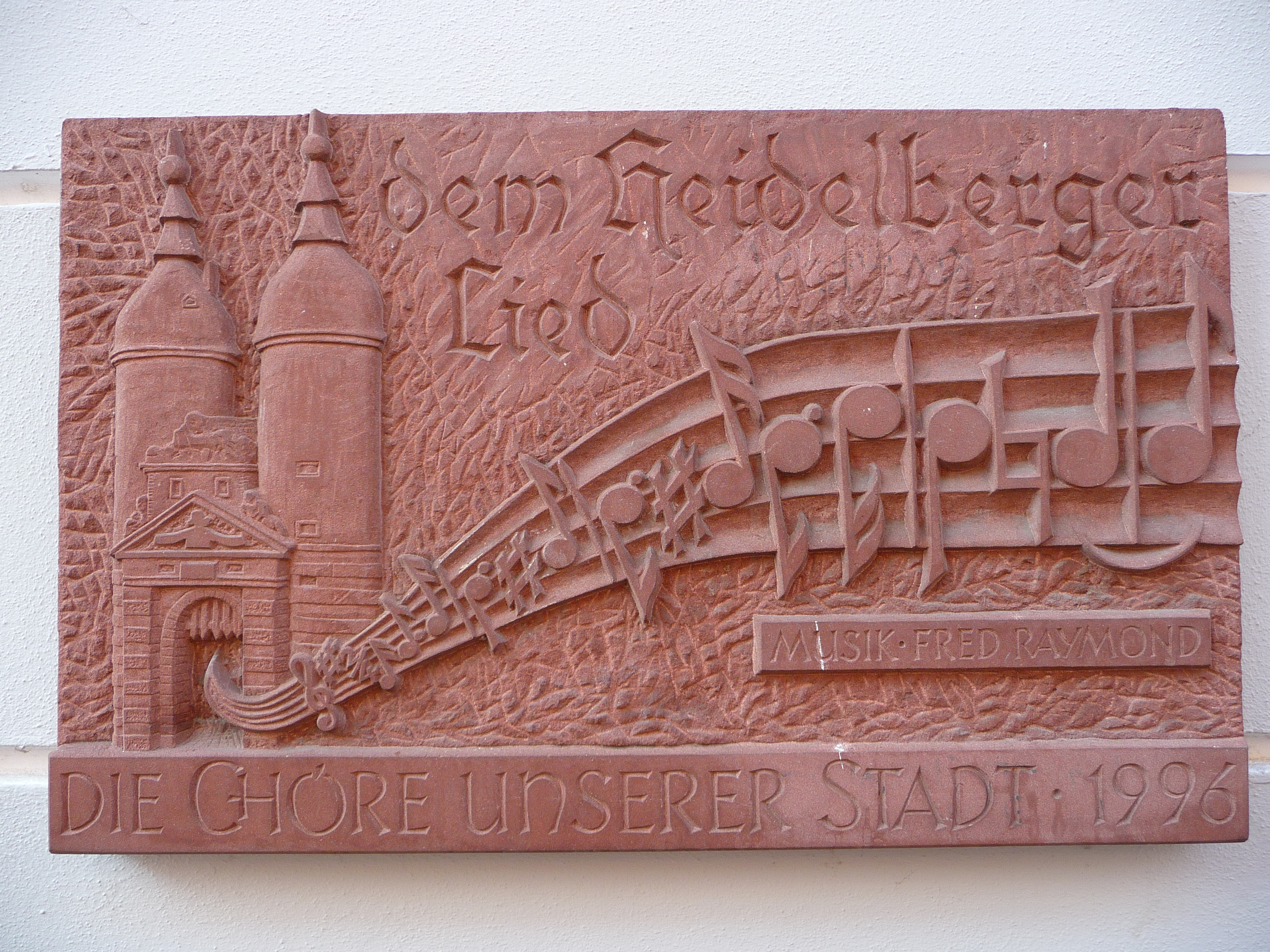 "Dem Heidelberger Lied" - Gedenktafel aus dem Jahr 1996, angebracht in der Heidelberger Altstadt (Baden-Württemberg, Deutschland)